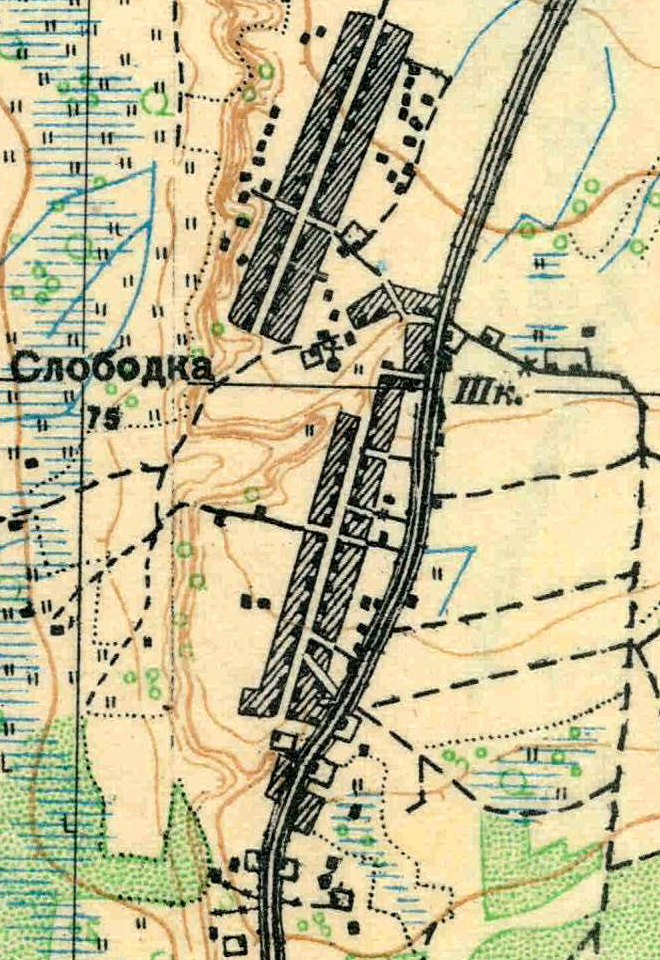 Топографическая карта Ленинградской области, квадрат О-35-9-Г-г (Косколово), деревня Слободка